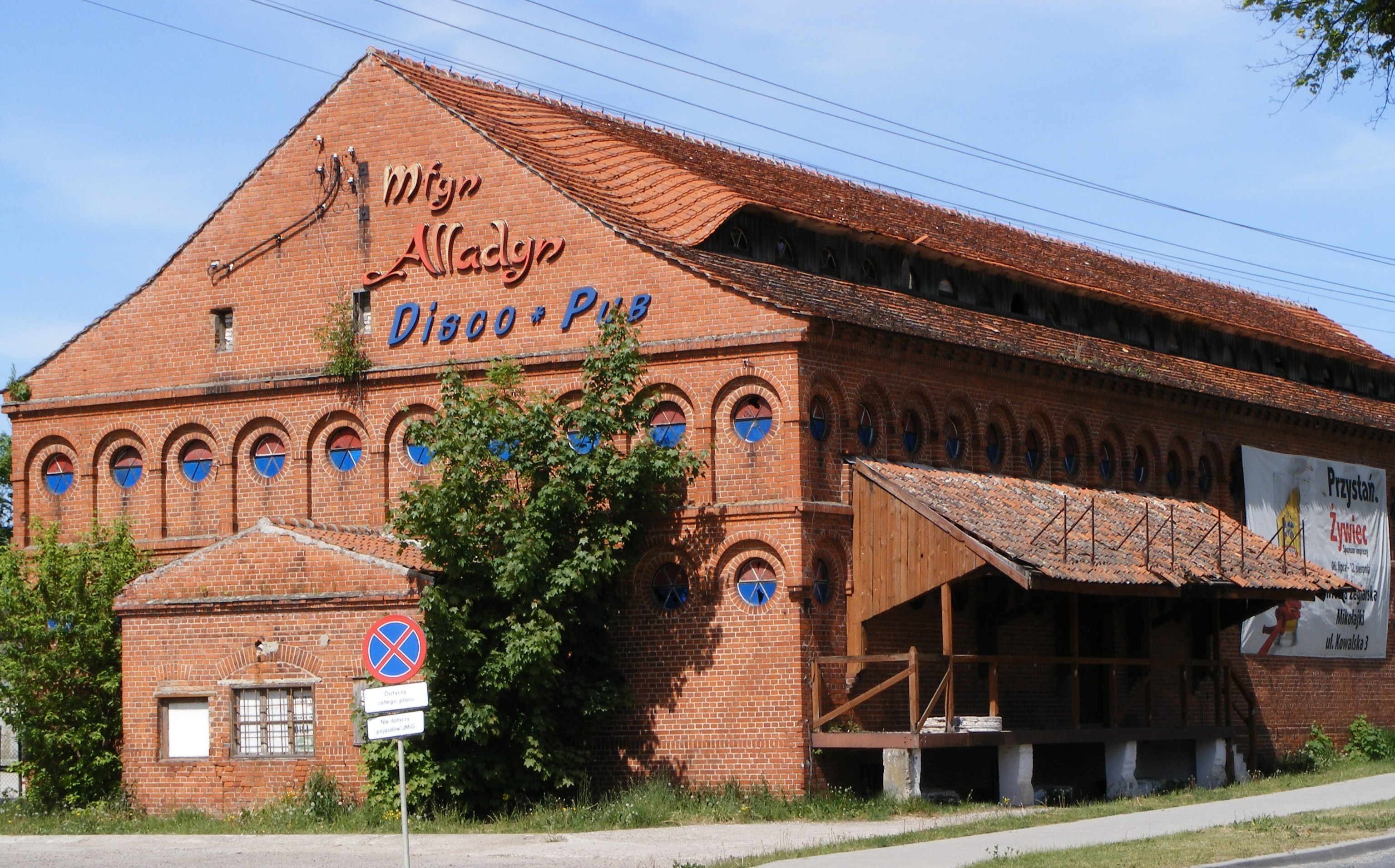 Młyn ALLADYN.